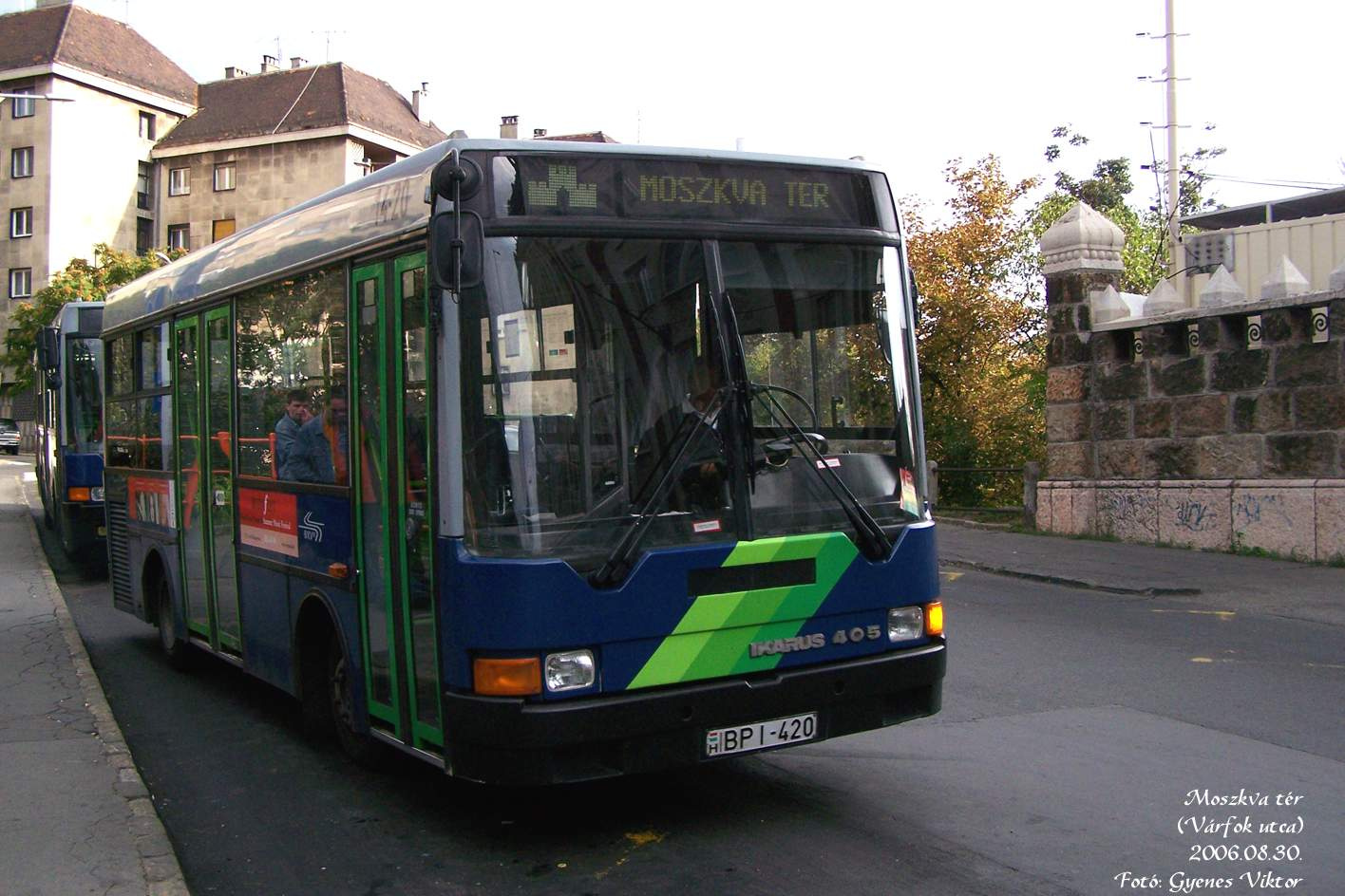 Várbusz a Várfok utcában, Ikarus 405